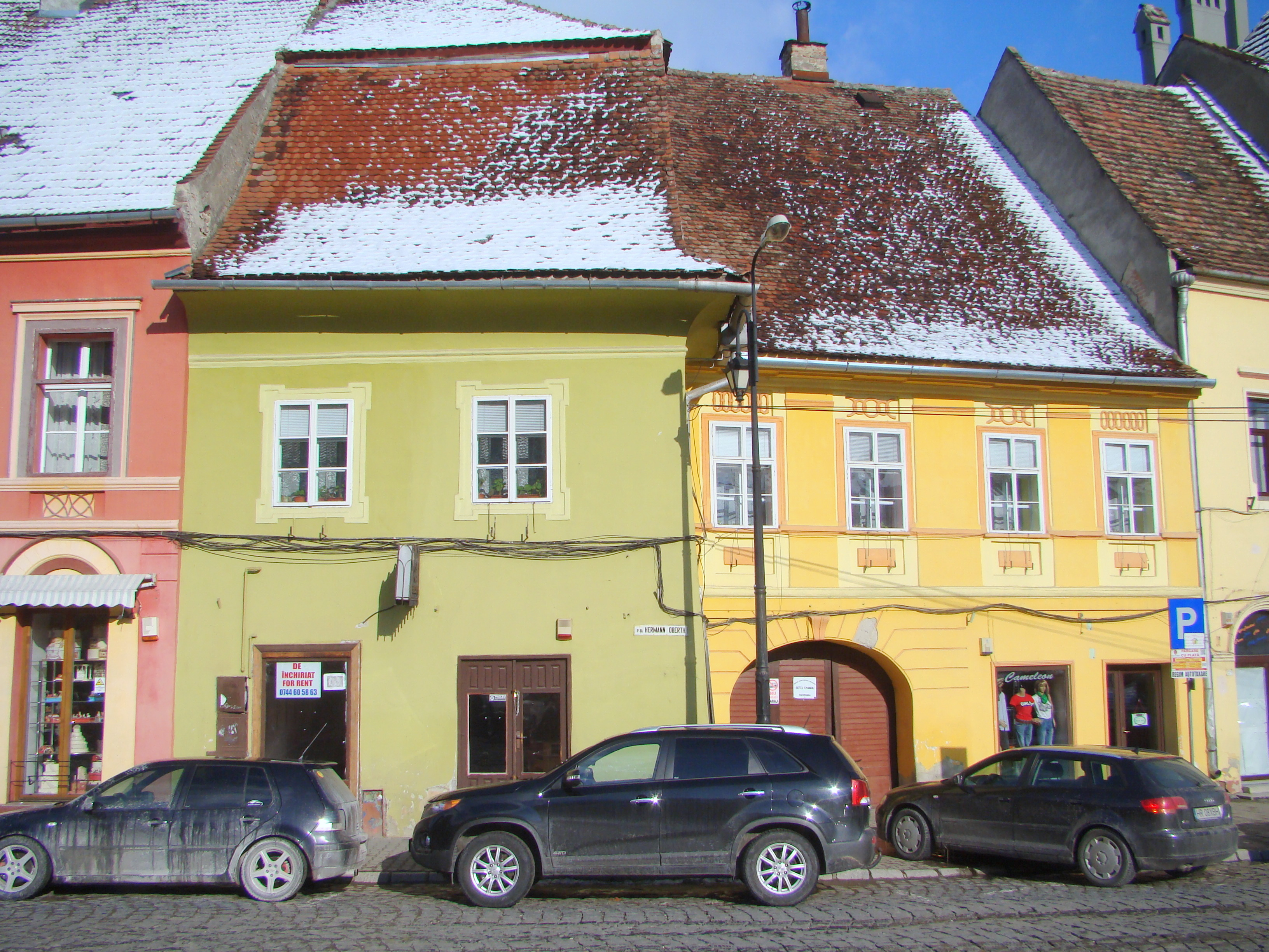 Casa Sartorius Baltes, municipiul Sighișoara, Piața Oberth Hermann 13 sf. sec. XVII - sec. XVIII